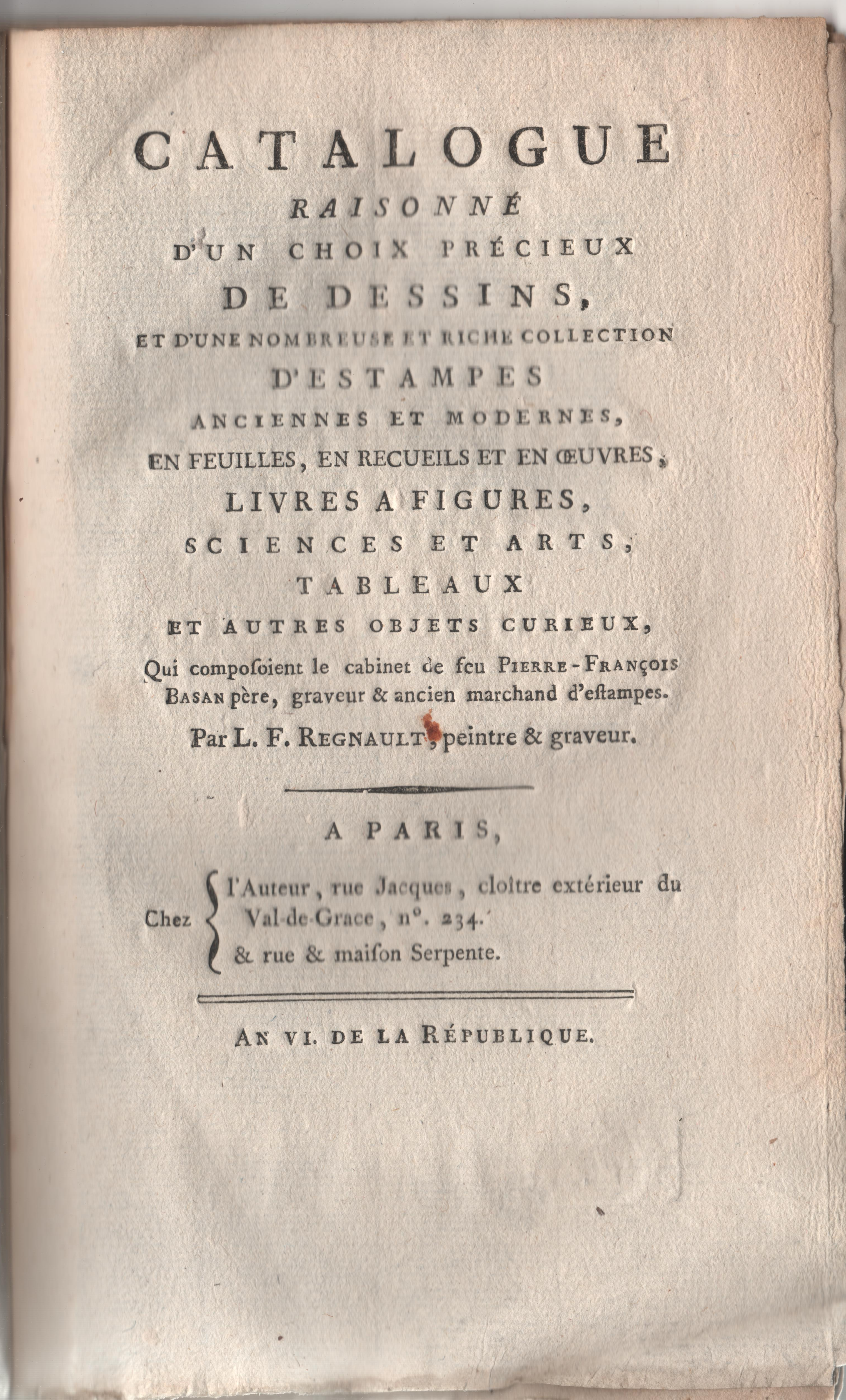 Catalogue raisonné d'un choix précieux de dessins et d'une nombreuse et riche collection d’estampes… livres à figures… tableaux et autres objets curieux… qui composoient le cabinet de feu Pierre-François Basan père, par François-Léandre Regnault-Delalande, Paris, 1798. ¨Page de titre